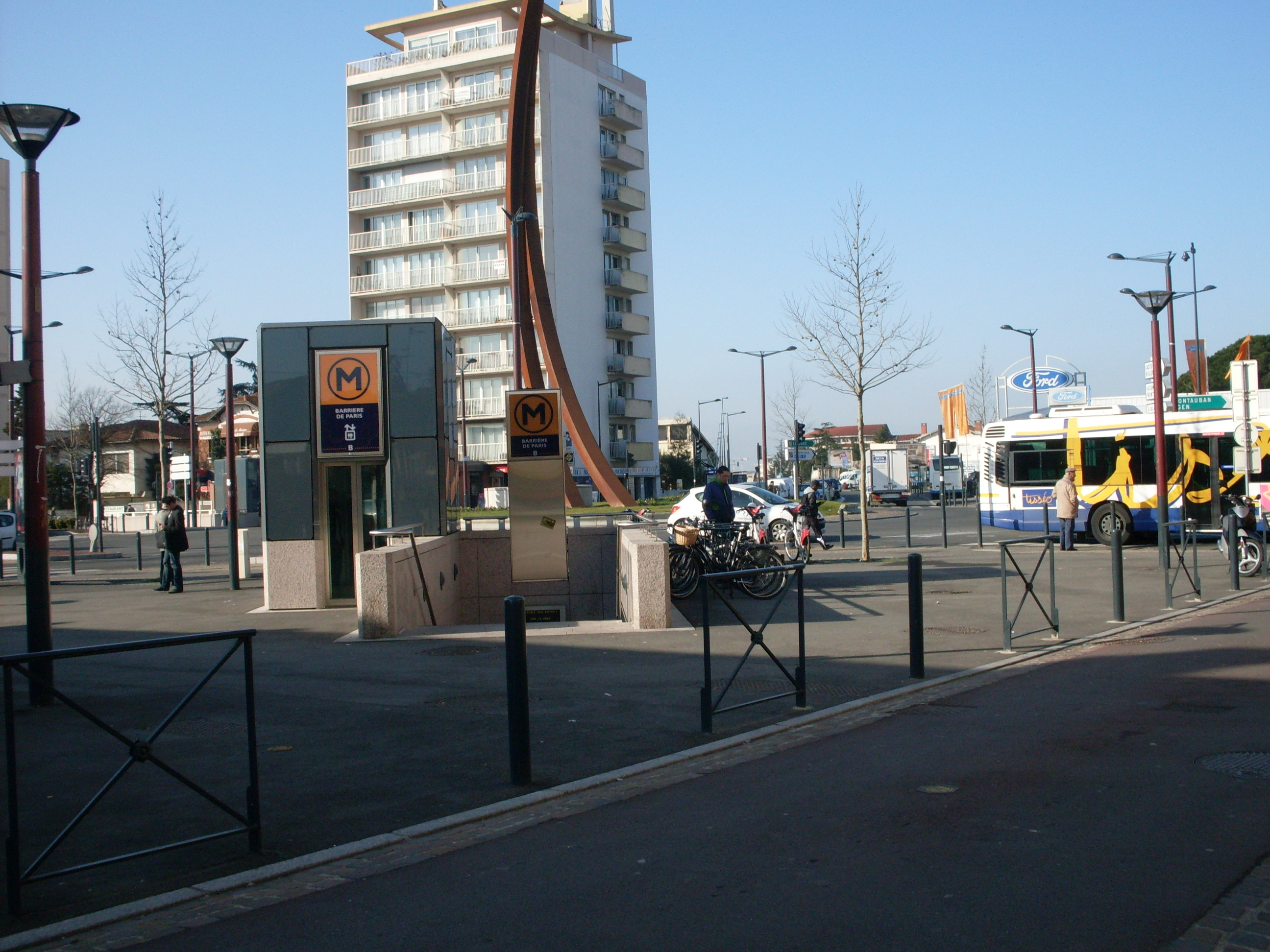 Place Barrière de Paris à Toulouse avec l'entrée du métro et un bus Tisséo.